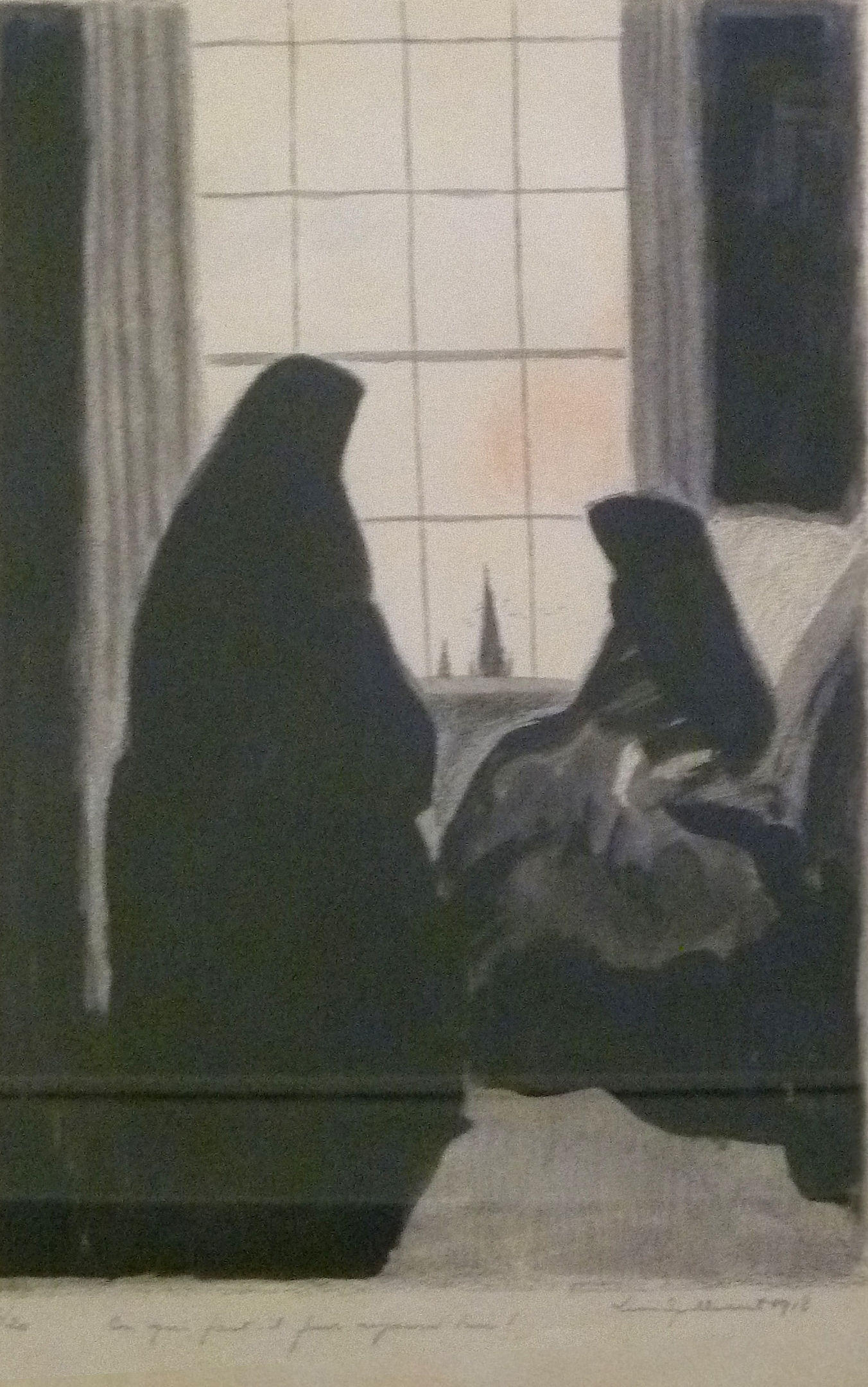 "Heures ternes" (1918); illustratie bij "Les Serres Chaudes" (Maurice Maeterlinck) door de Belgische kunstenaar Léon Spilliaert; litho, kleurpotlood, Oost-Indische inkt op papier (490 x 367 mm); privéverzameling